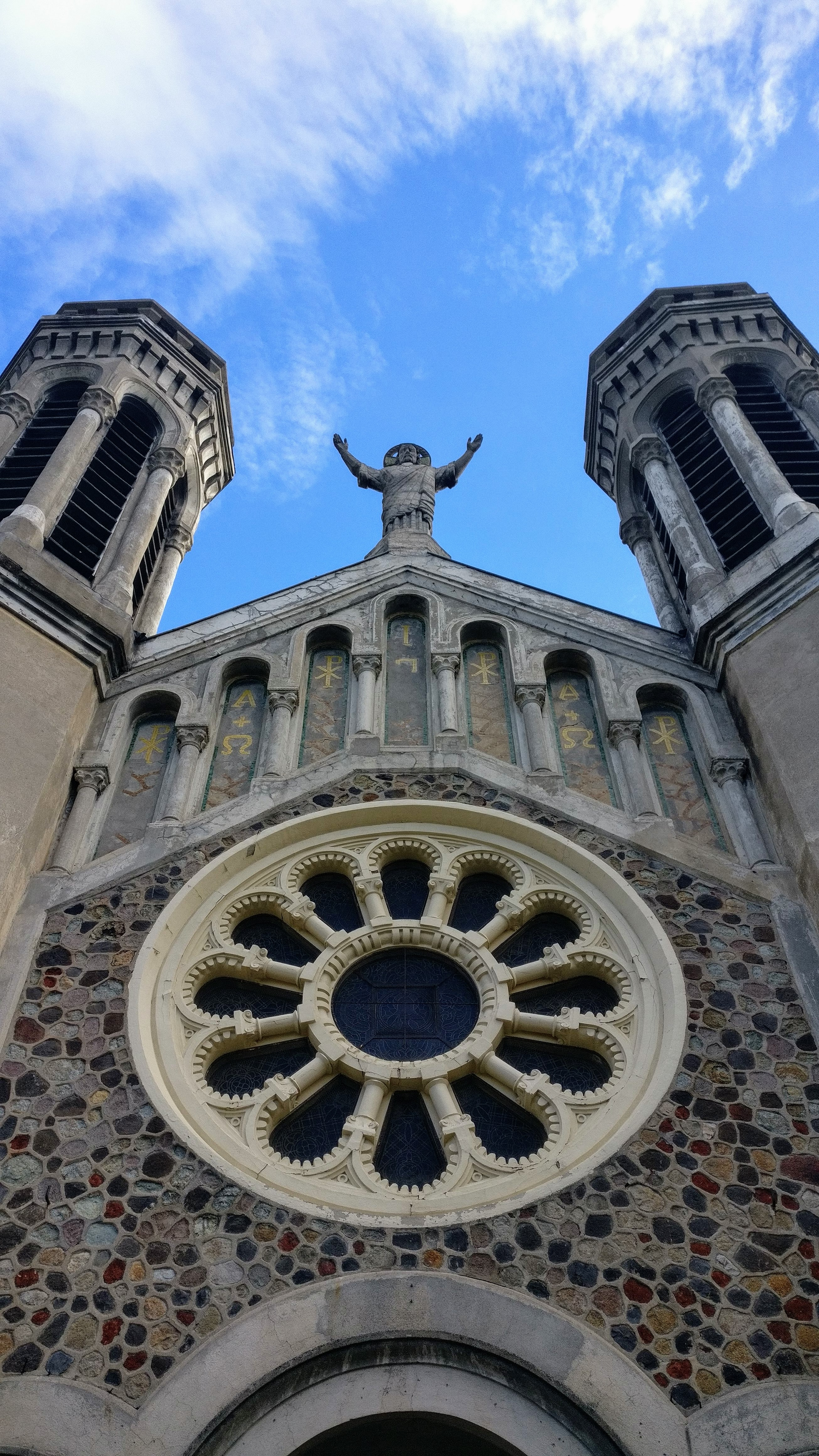 Photo de face de l'Eglise du Sacré-Cœur, située sur le Boulevard Lafayette à Clermont-Ferrand (Puy-de-Dôme, France)